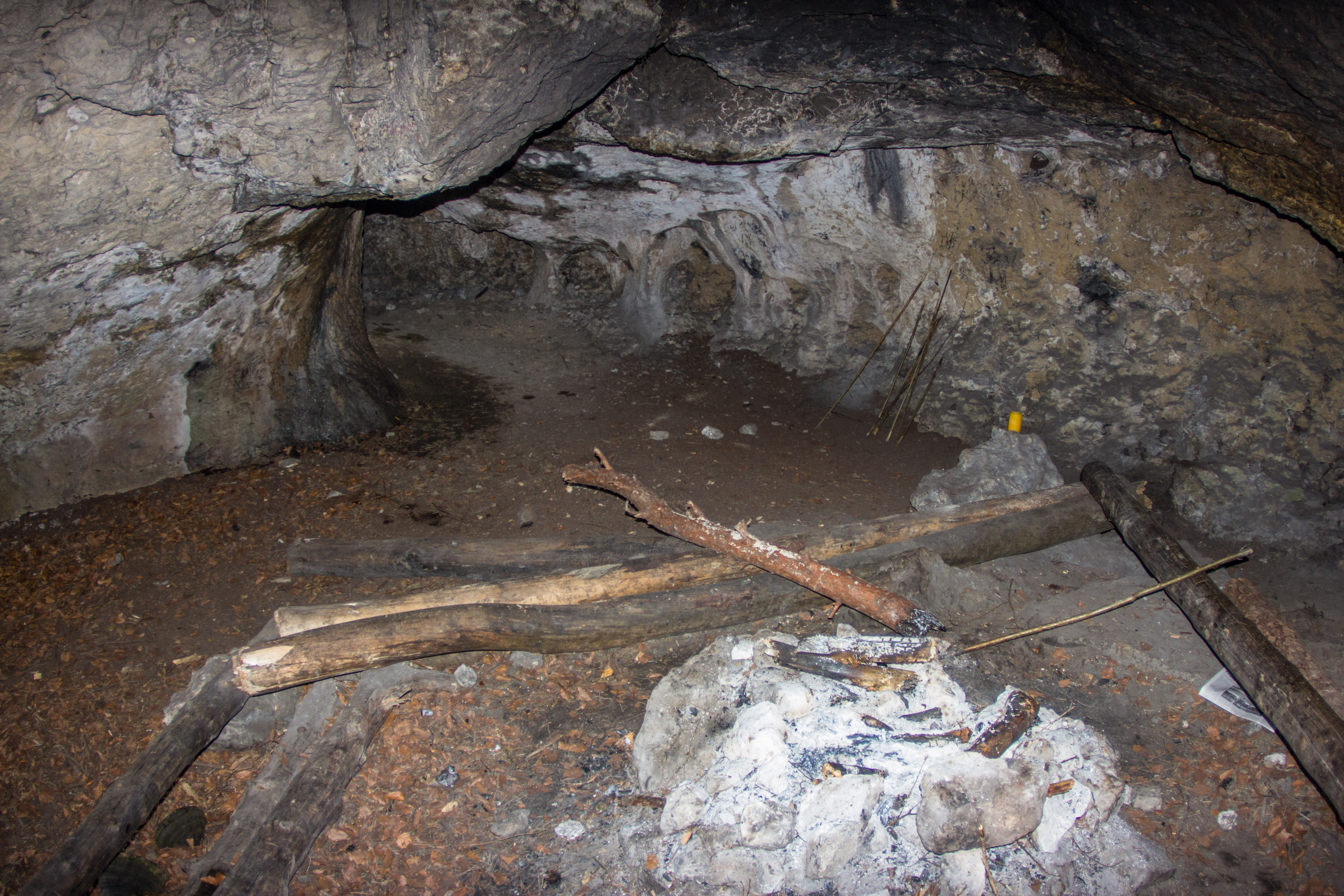 Cäciliengrotte